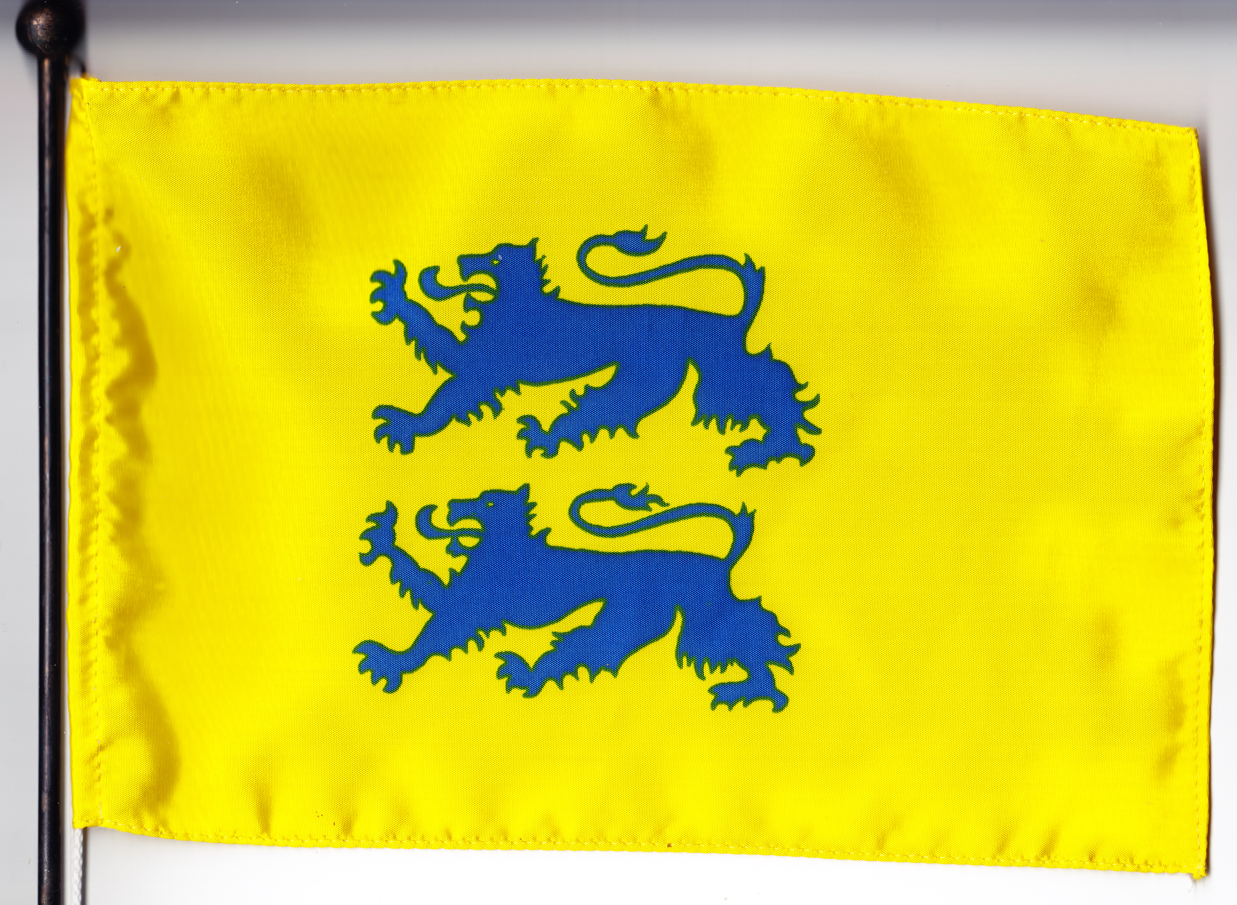 Sydslesvigsk flag med de to blå slesvigske løver på gul flagdug fra tiden efter 2. verdenskrig og frem til idag.